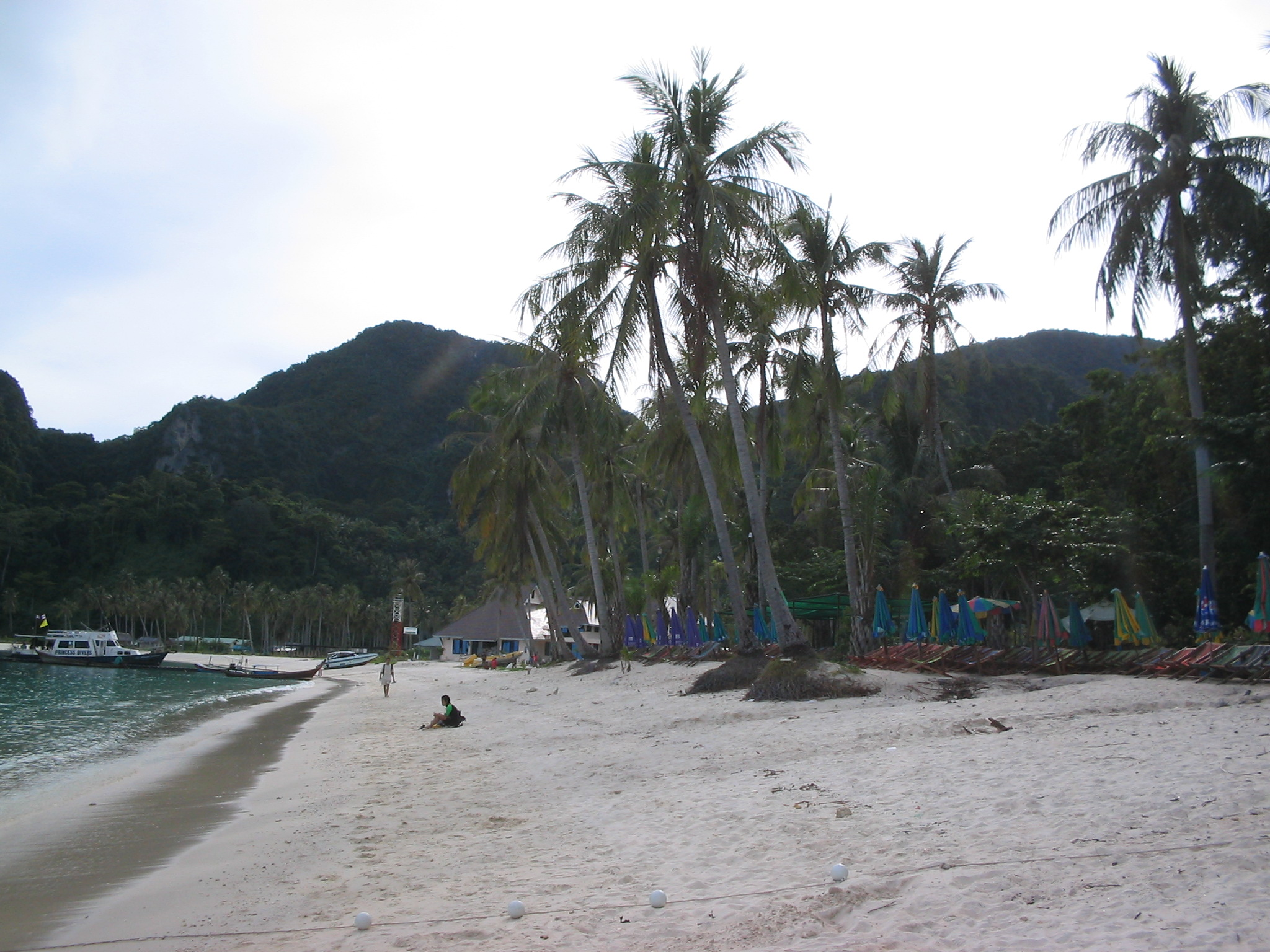 Beach on Koh Phi Phi Don, Thailand